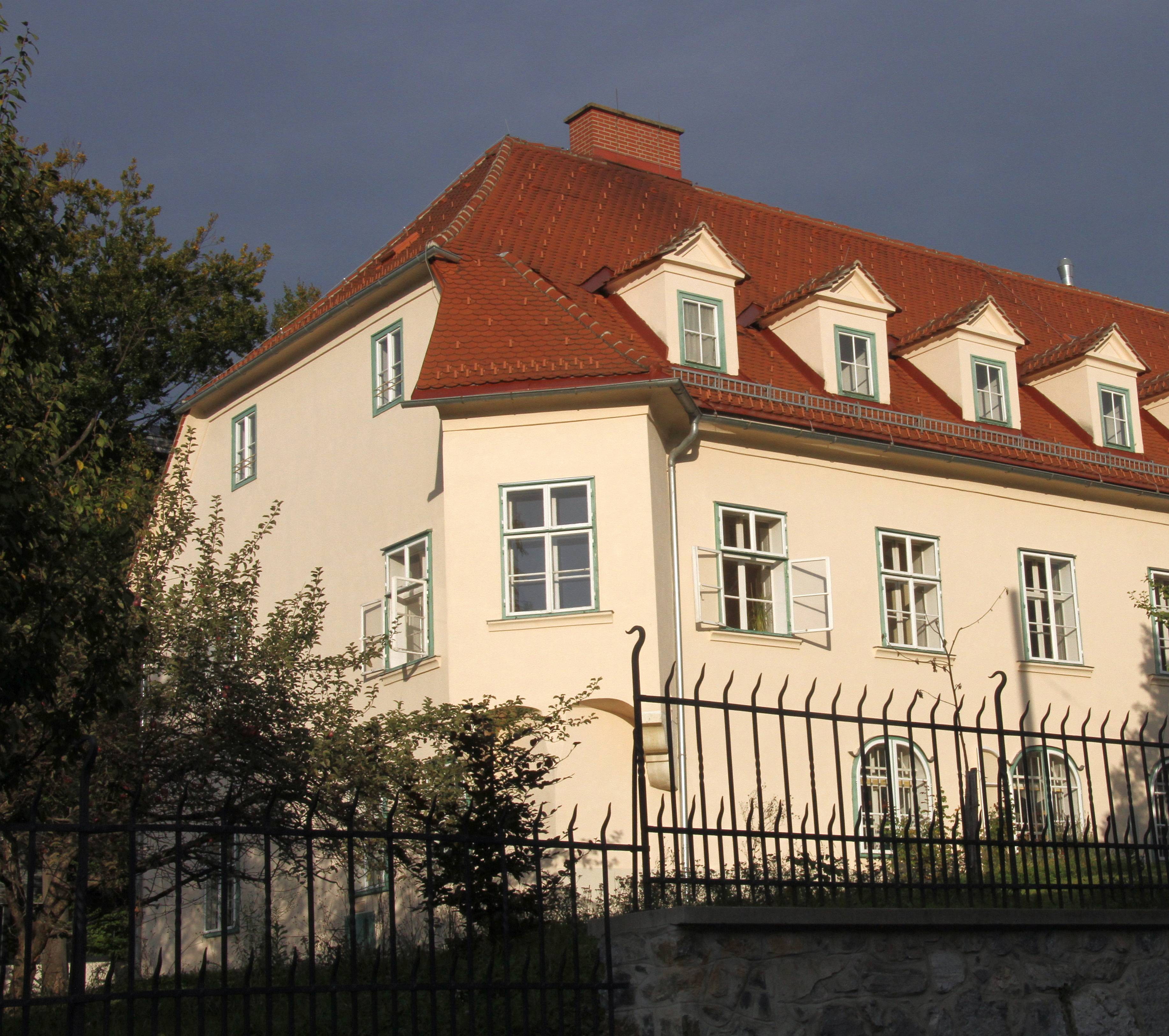 Ansitz, Landesschülerheim, auch Bonaparte-Villa genannt, Herdergasse 3, Graz, Österreich